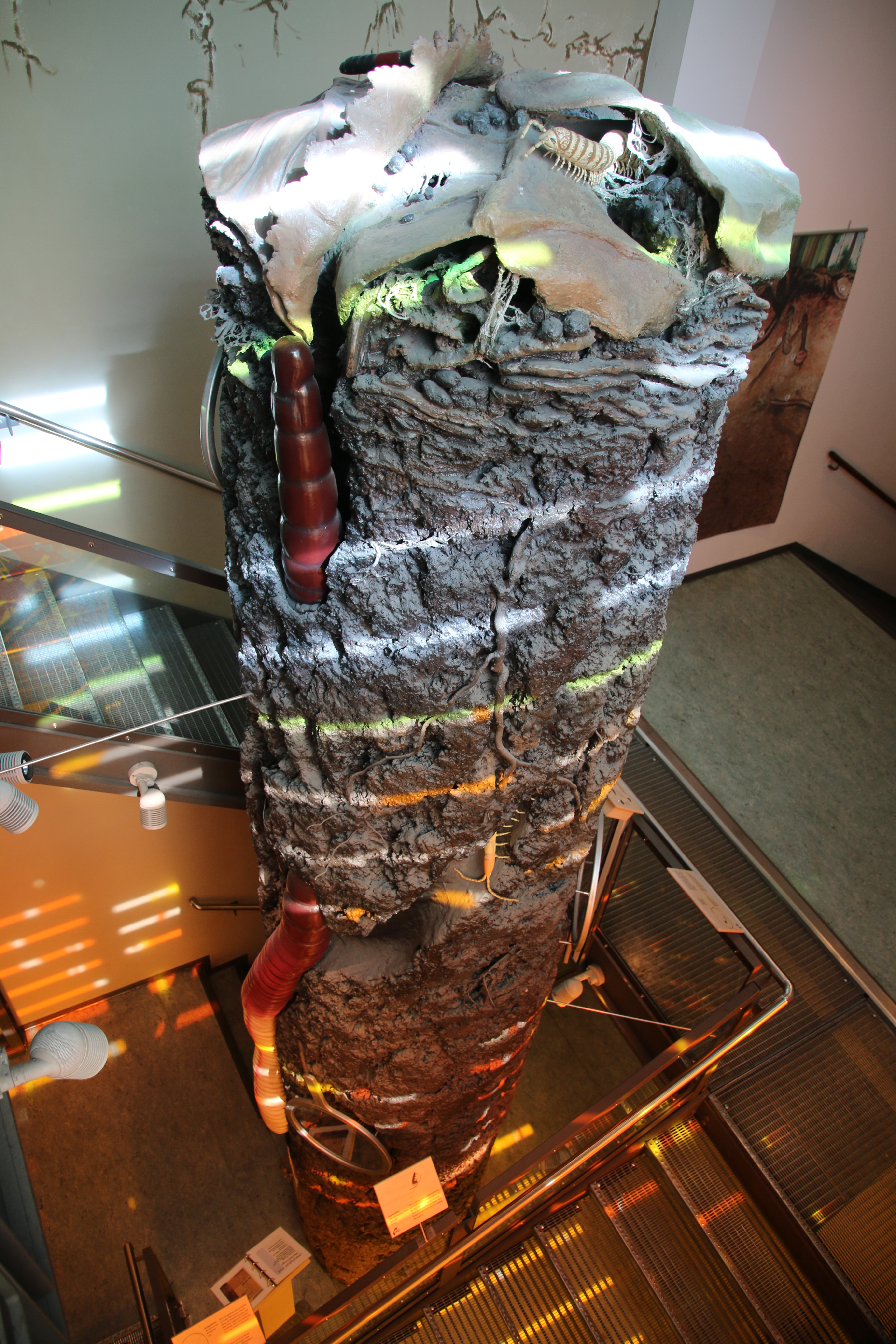 Bodensäule vergrößert, im Senckenberg Museum für Naturkunde Görlitz